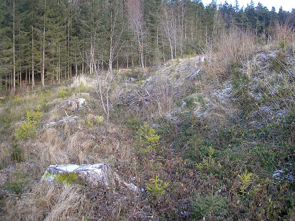 Frühmittelalterlicher Ringwall bei Mittelstetten (Landkreis Fürstenfeldbruck, Oberbayern). Die Nordwestseite der Wallanlage. Eigene Aufnahme, Dez. 2007 / Early Middle Ages ringwork castle near Mittelstetten (Landkreis Fuerstenfeldbruck, Upper Bavaria, Germany). North western part of the fortifications. Own photo, Dec. 2007